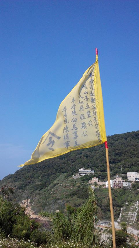 南竿牛峰境補庫旗神尊駕前補庫